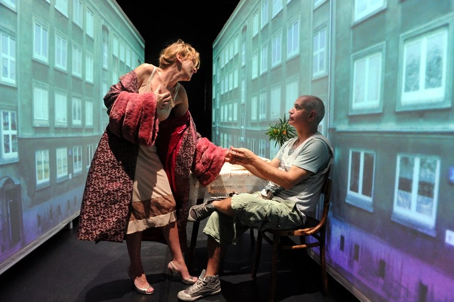 לני שחף מתוך רוחות מוראנוב